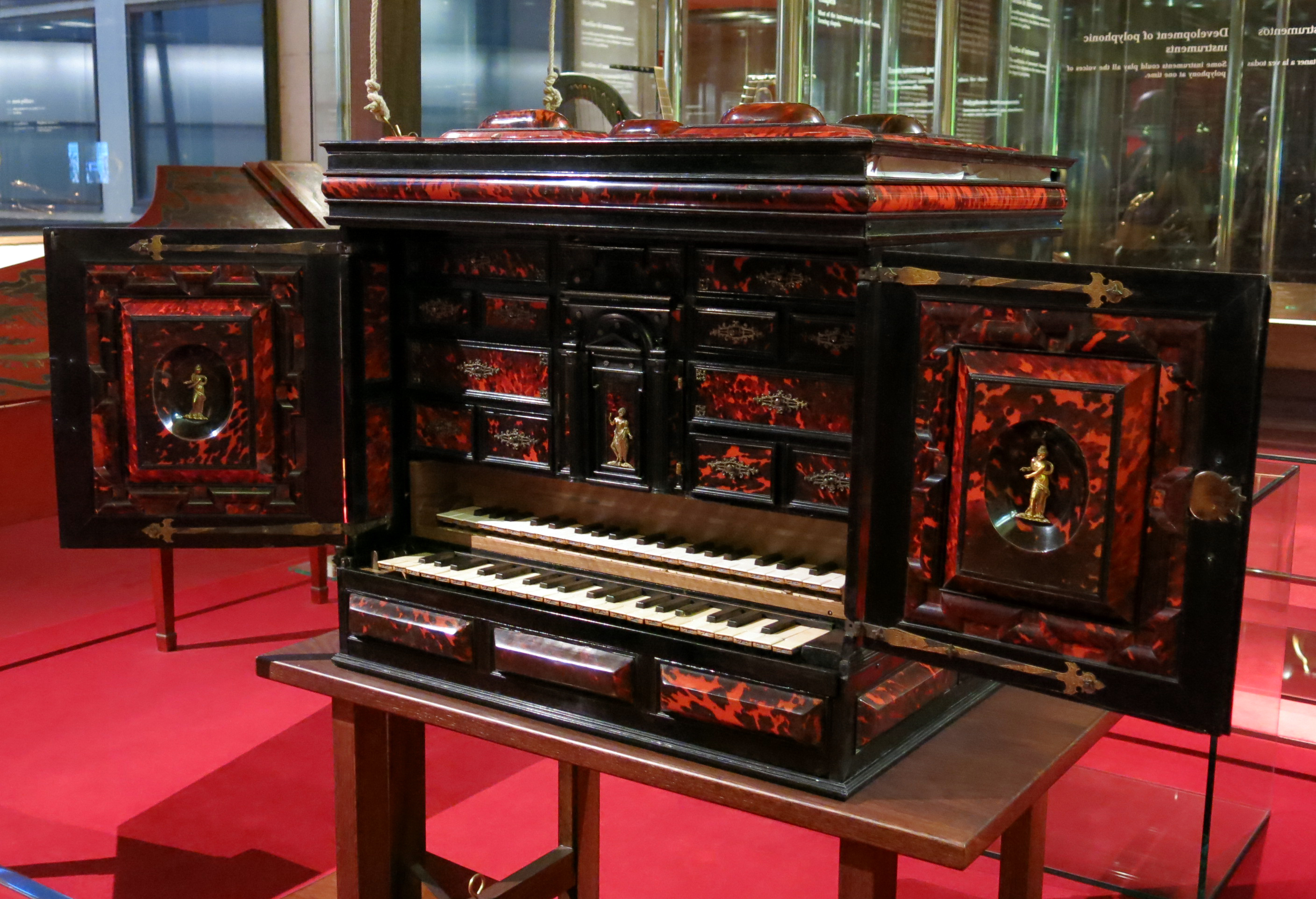 Claviorganum by Lorenz Hauslaib, Nuremberg. ca. 1590. Museu de la Música de Barcelona (MDMB 821)